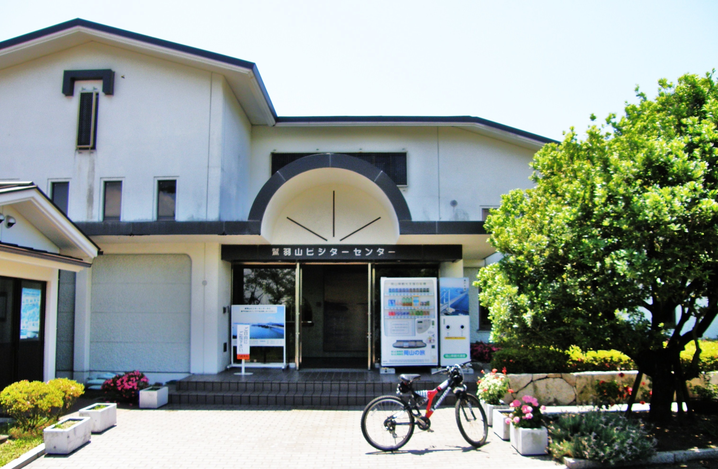 鷲羽山 ビジターセンター